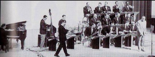 Radiobandet ger jazzkonsert. Producenten Olle Helander närmar sig orkesterledaren Harry Arnold till höger. fr.v. Bengt Hallberg piano, Georg Riedel bas, Egil Johansen trummor, Arnold Johansson, Weine Renliden, Sixten Eriksson, Bengt-Arne Wallin, Benny Bailey trumpeter, George Vernon, Åke Persson, Andreas Skjold, Gordon Olsson tromboner, Jonny Ekh, Bjarne Nerem, Arne Domnérus, Rolf Bäckman, Rolf Blomquist saxofoner. Foto: Bengt H Malmqvist.